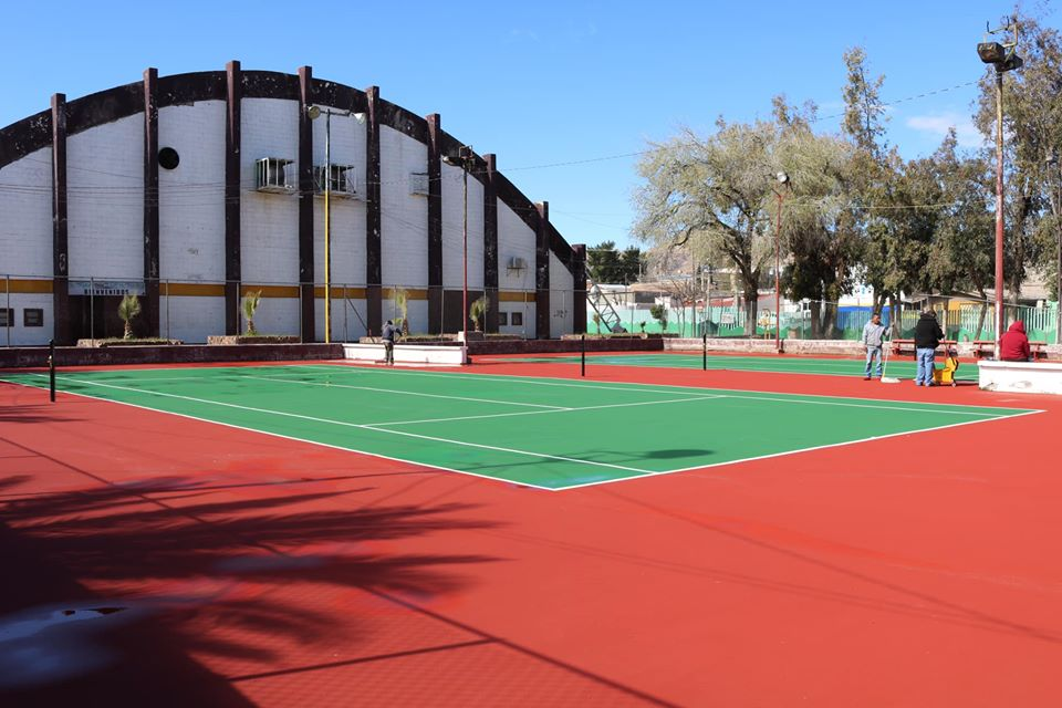 Cancha de Tenis de la Unidad Deportiva Gustavo Diaz Ordaz, futuro Estrellas Nogalenses, atrás el estadio de basquet